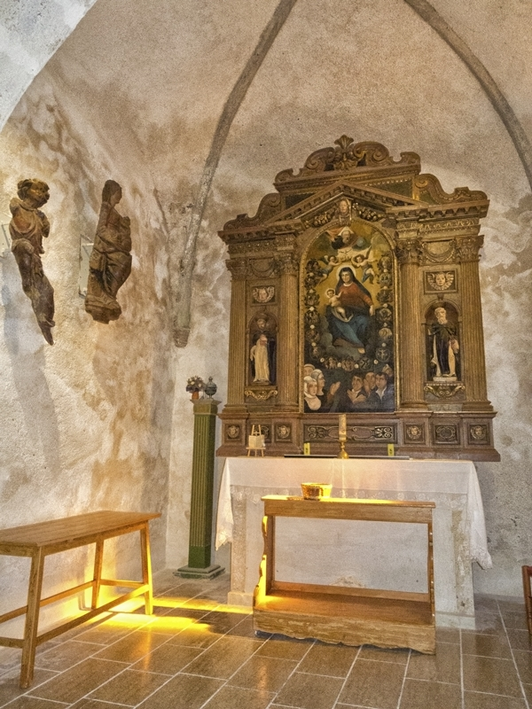 Crkva sv. Lucije u Jurandvoru